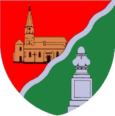 Die Niederösterreichische Landesregierung hat in ihrer Sitzung vom 21. März 2000 der Gemeinde Hauskirchen das Recht zur Führung des Gemeindewappens verliehen. Die Verleihung erfolgte in Anerkennung und Würdigung der ständigen Verbesserung der kommunalen Einrichtungen in den letzten Jahrzehnten.